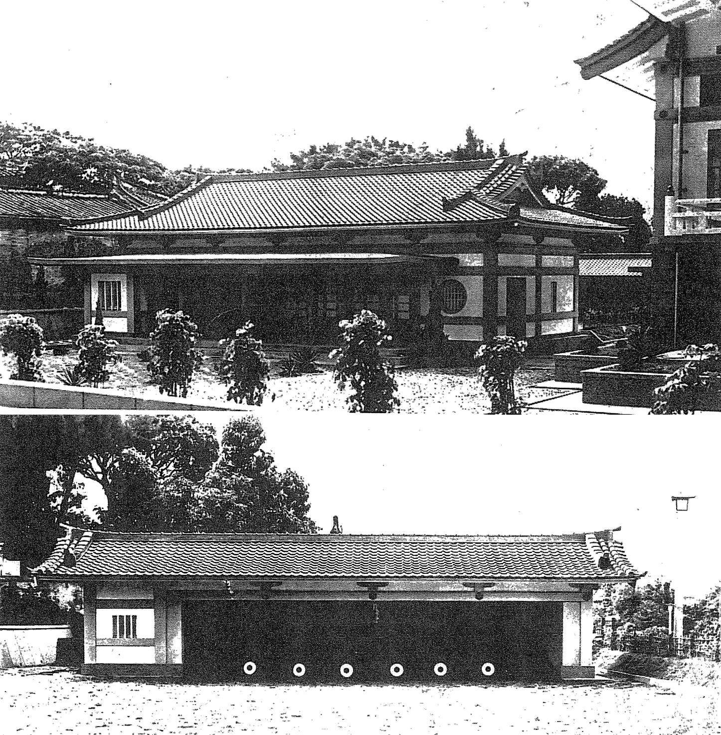 中文（台灣）: 台南武德殿大弓道場位於台南武德殿與台南孔廟之間，上圖為大弓場射場，下圖為大弓場垛。現今皆已不存。